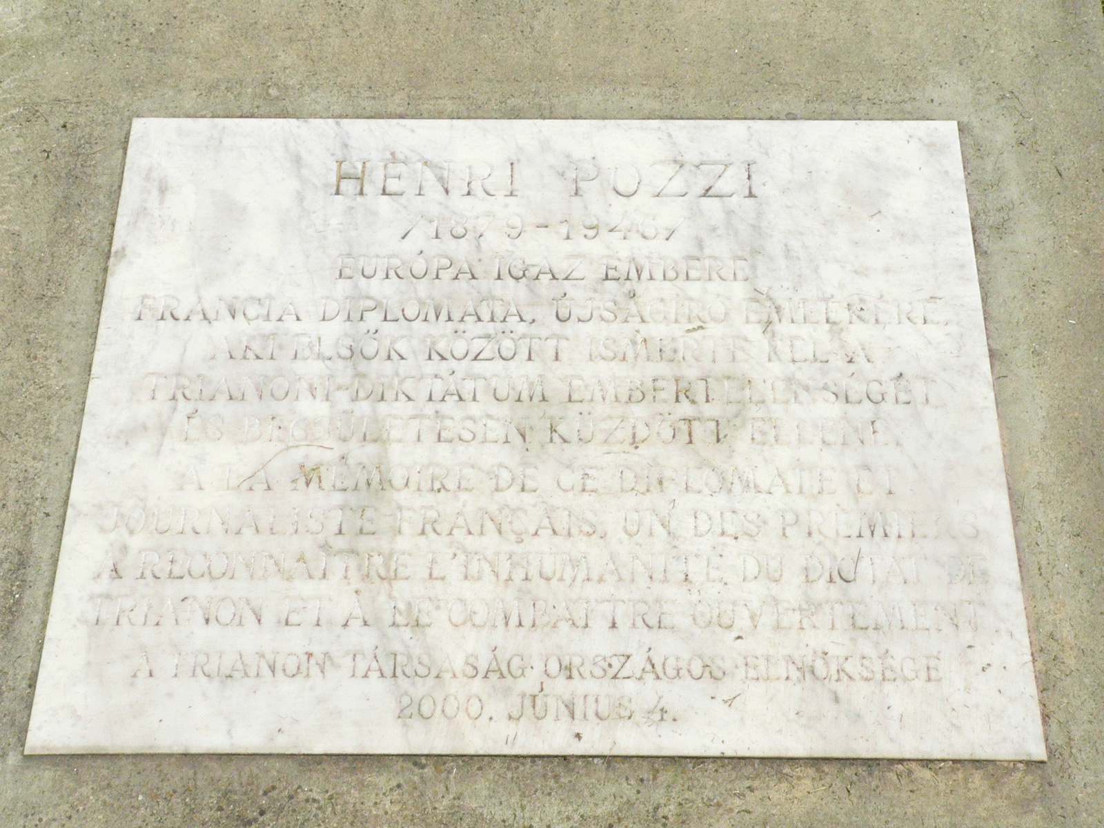 Zebegény, Országzászló és hősi emlékmű, Henri Pozzi emléktáblája